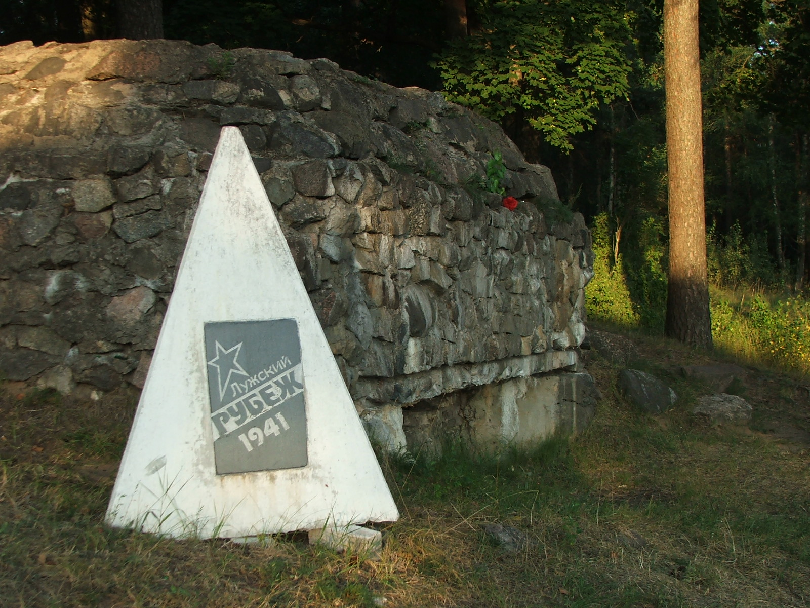 ДОТ на Лангиной горе, на месте Лужского рубежа в г. Луга, Лен. обл.